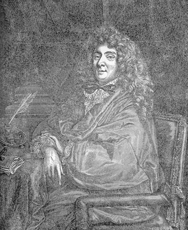 "Molière" after Sébastien Bourdon (1616–1671) by French engraver Jacques Firmin Beauvarlet (1731-1797)